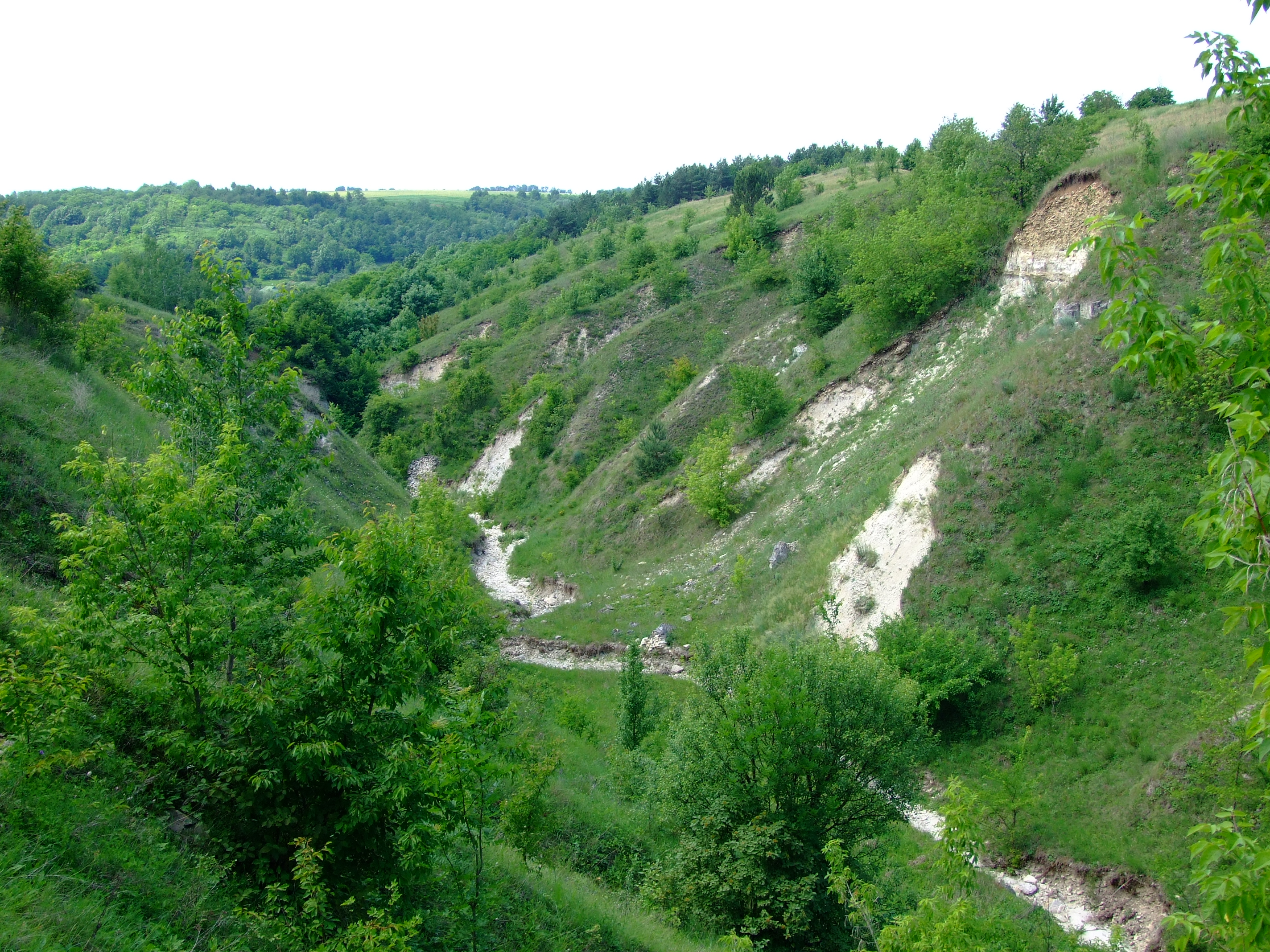 Шкаліків яр, Мурованокуриловецький р-н, с. Роздолівка